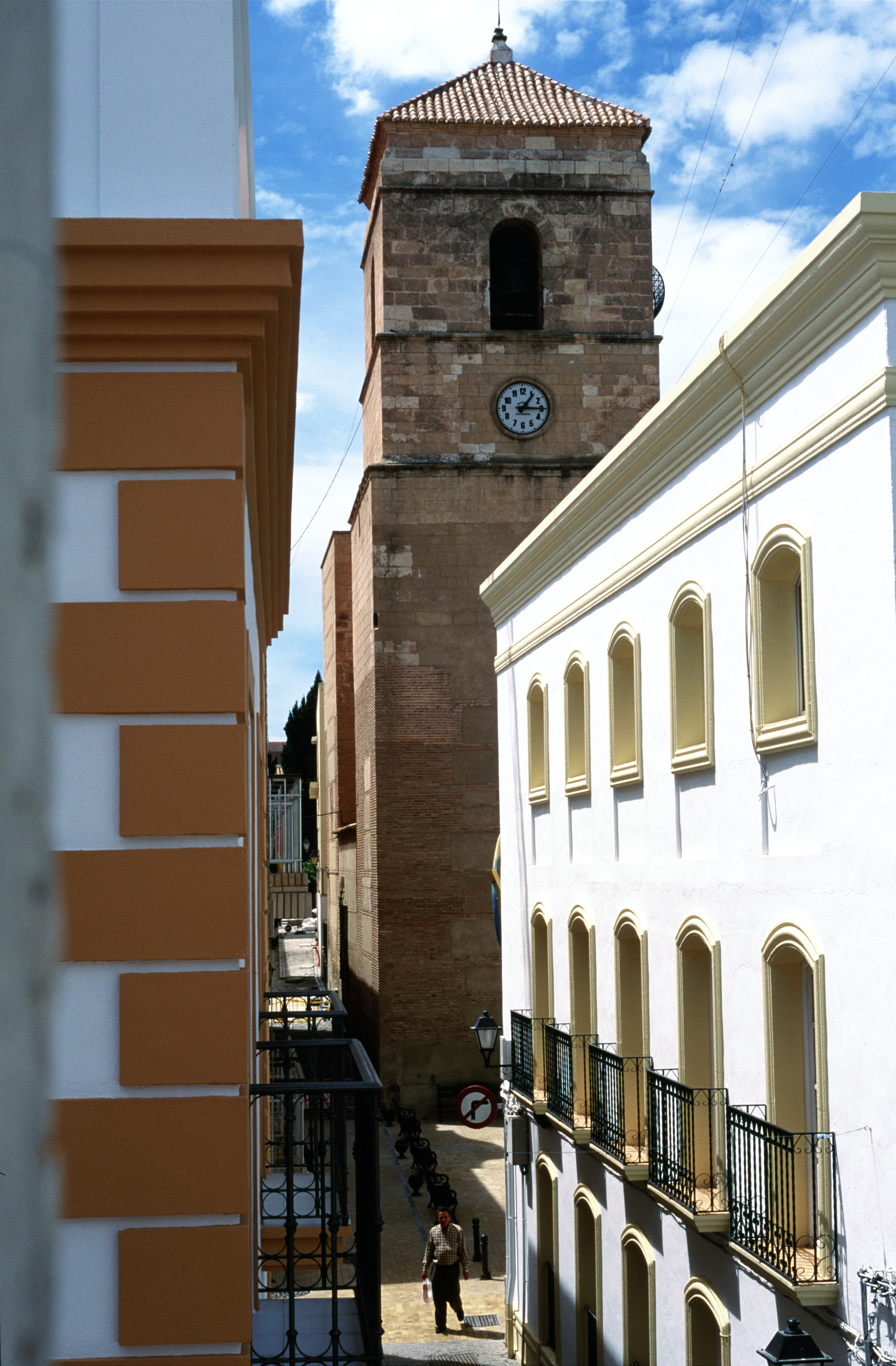 Torre del campanario de cinco esquinas